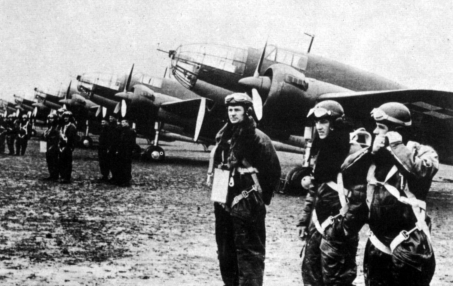 PZL.37 Łoś, polskie bombowce produkowane w latach 1936-1939. Pierwszy pułk lotniczy. Na zdjęciu słynne "Łosie". Używano ich do bombardowania obiektów, zwalczania bombami wojsk pancernych. Ogółem "Łosie" wykonały około 100 lotów bojowych, podczas walk zestrzeliły 5 samolotów.[Opis oryginalny]